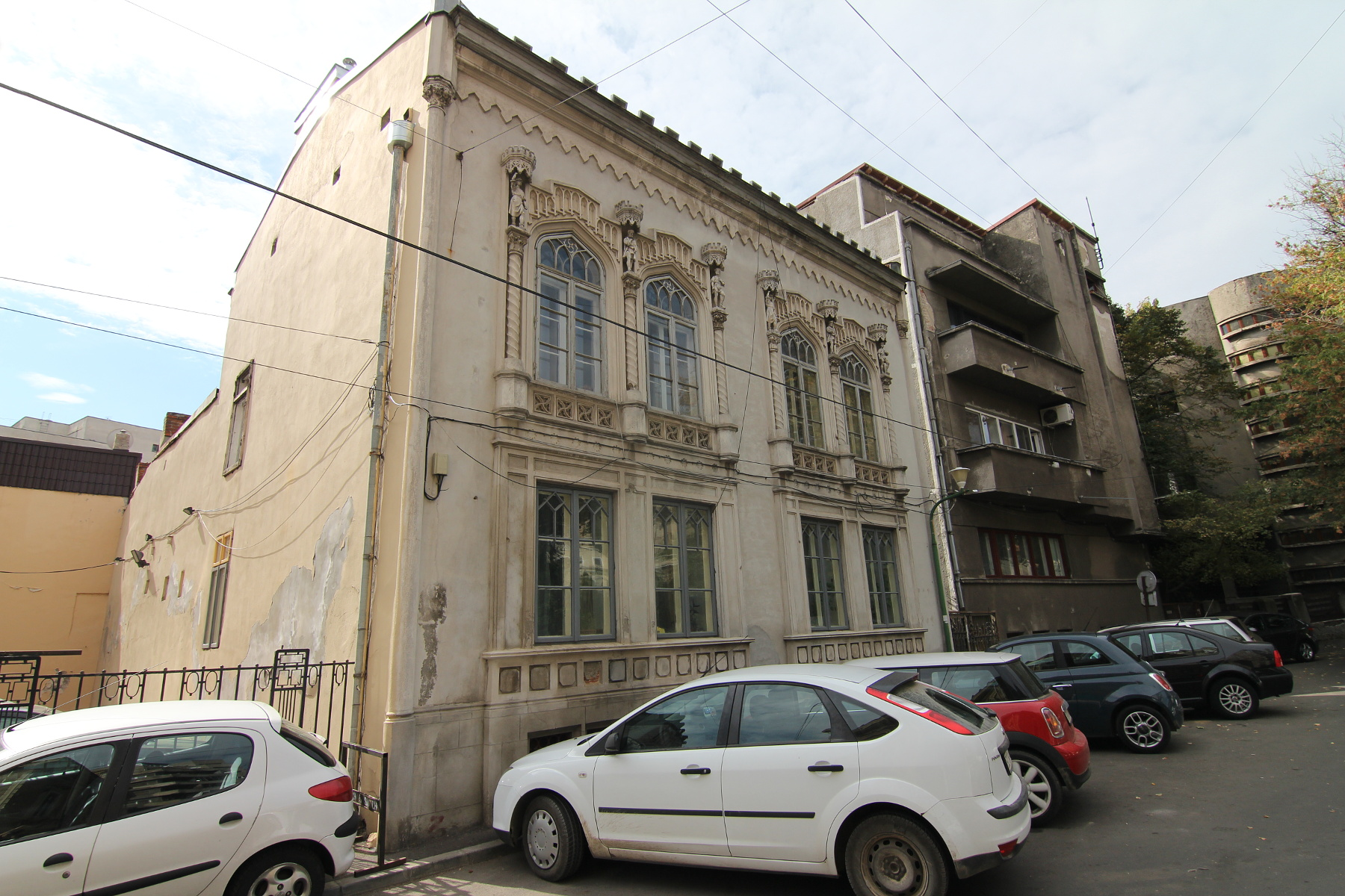 Casa Breslelor